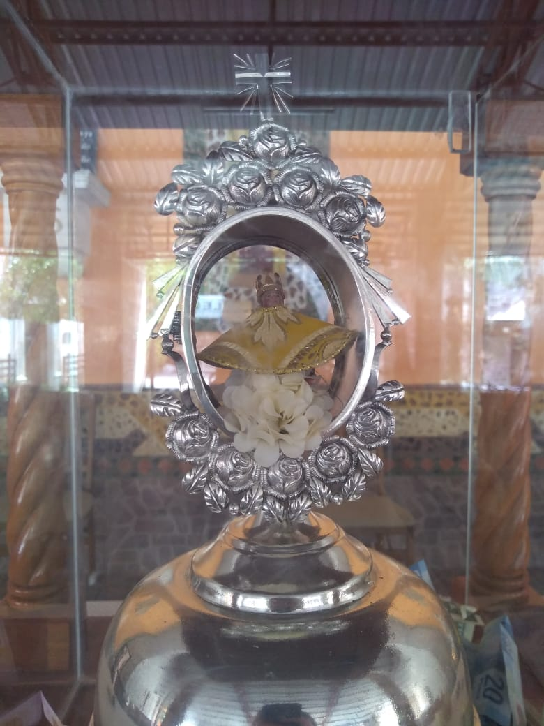 Santo Niño del Cacahuatito en Mezquitic, Jalisco, México